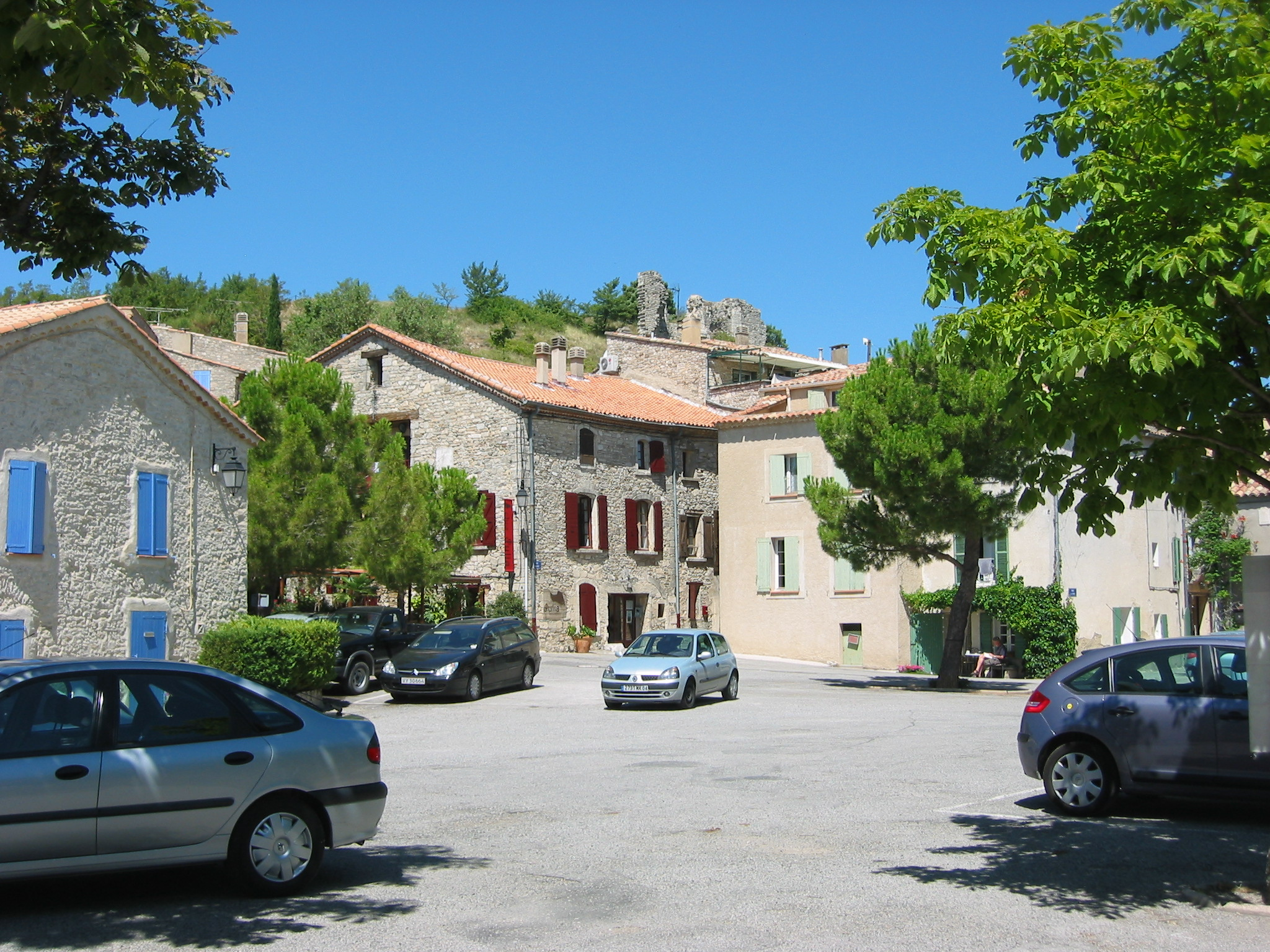 Montfuron, Alpes-de-Haute-Provence, France Les rues du village Photo prise le 30 juillet 2006 Aut : civodule